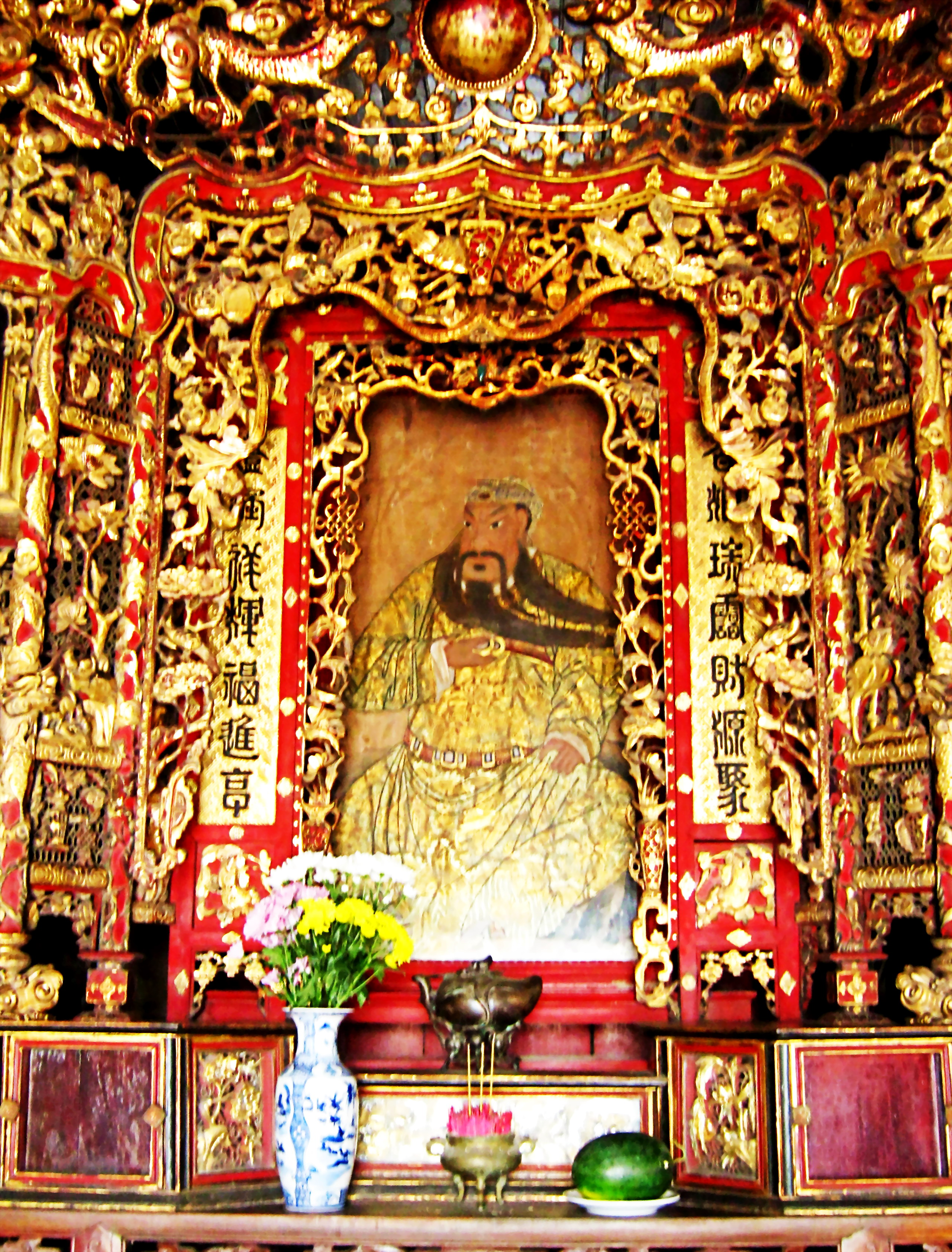 Bàn thờ Quan Công trong nhà cổ Huỳnh Thủy Lê ở nội ô thị xã Sa Đéc, tỉnh Đồng Tháp, Việt Nam. Bức tranh thờ này có thể được vẽ vào cuối thế kỷ 19.